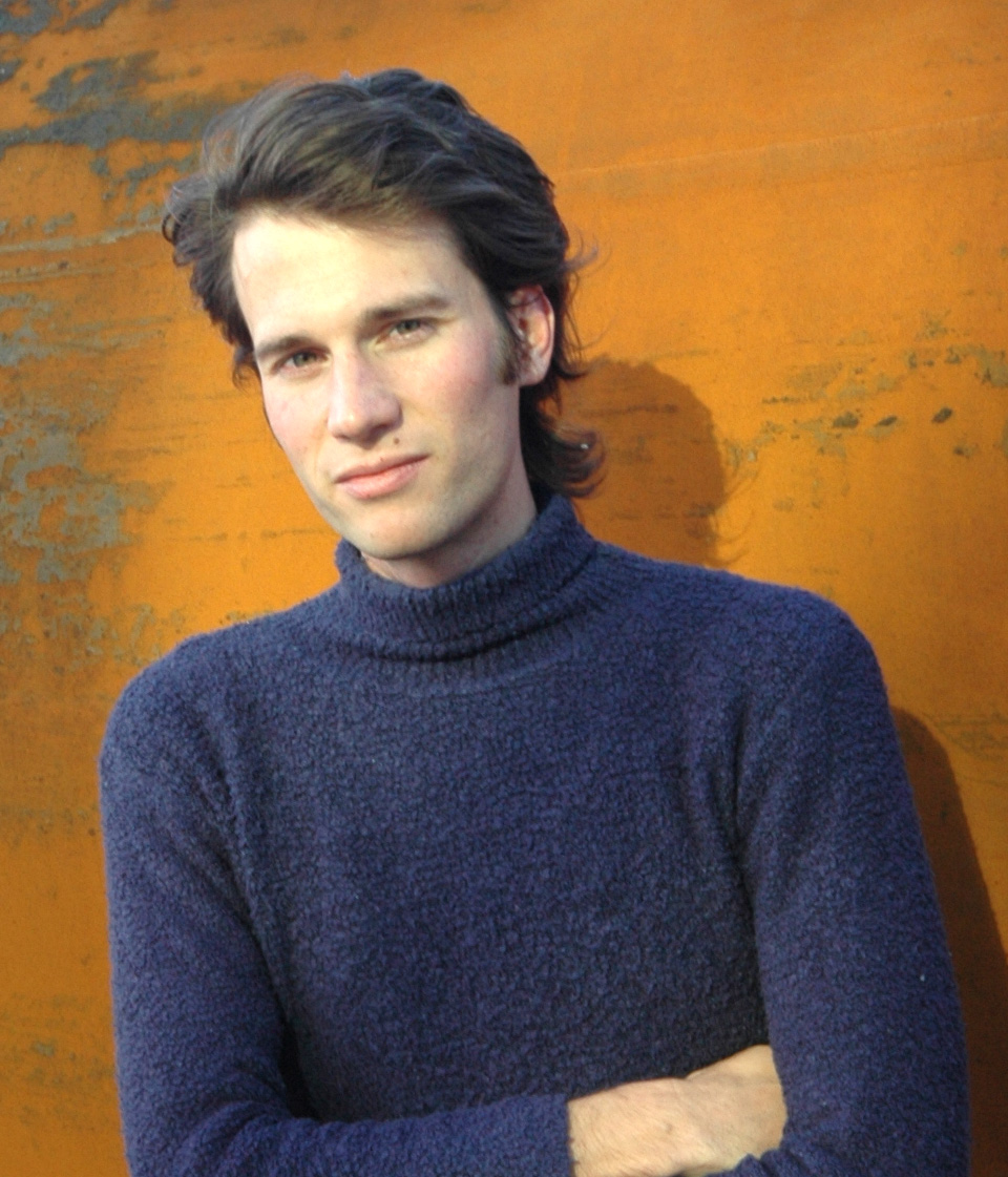 Merlijn Twaalfhoven (Wapserveen, 14 februari 1976) is een Nederlandse componist en organisator van multidisciplinaire muziekevenementen.